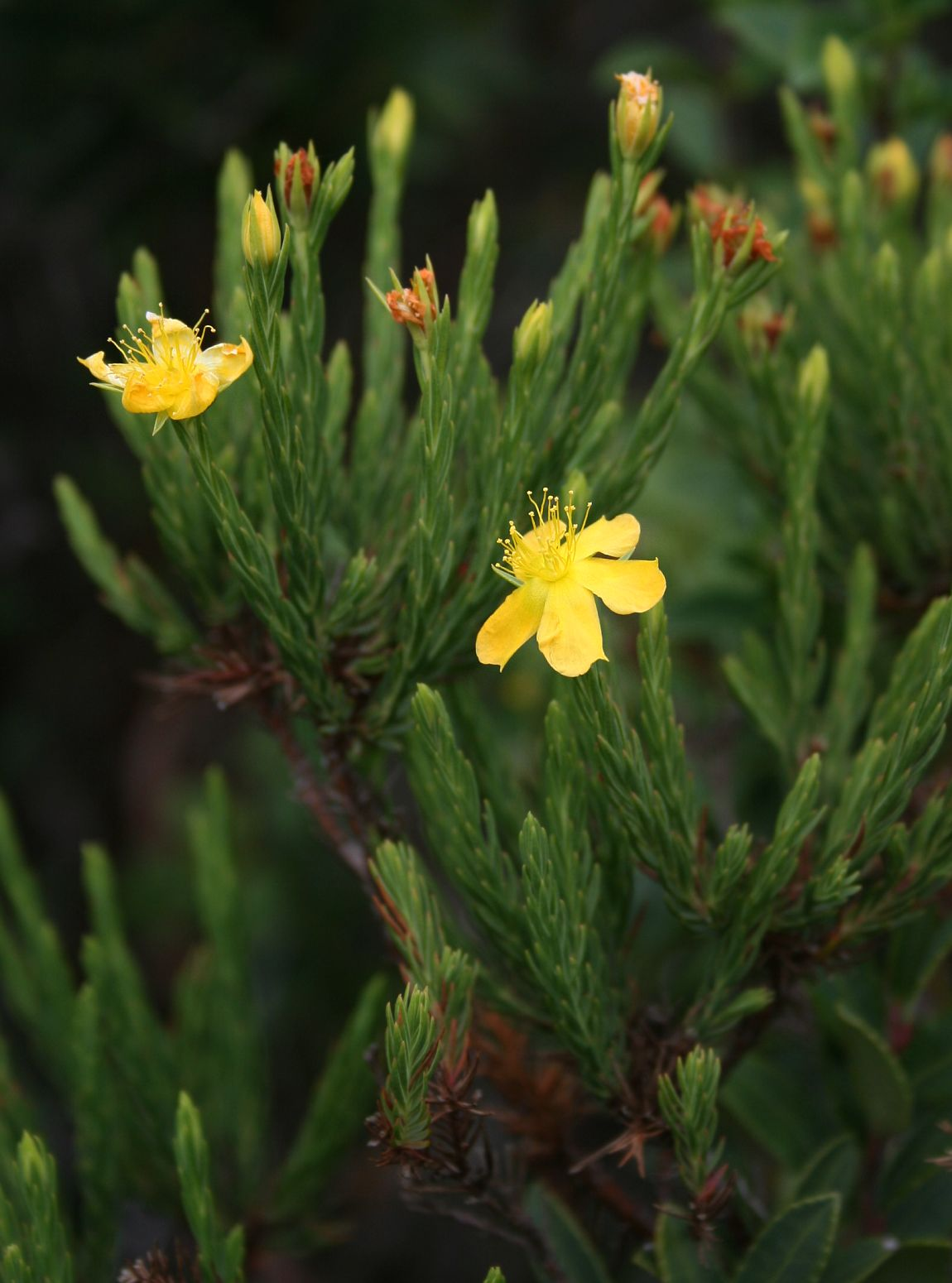 Hypericum costaricense, Johanniskrautgewächse (Hypericaceae) - Costa Rica: Prov. Alajuela, Parque Nacional Volcán Poás, 2550-2600 m